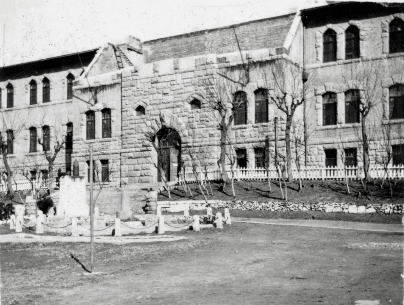 青岛督署学校新教学楼旧址火灾后